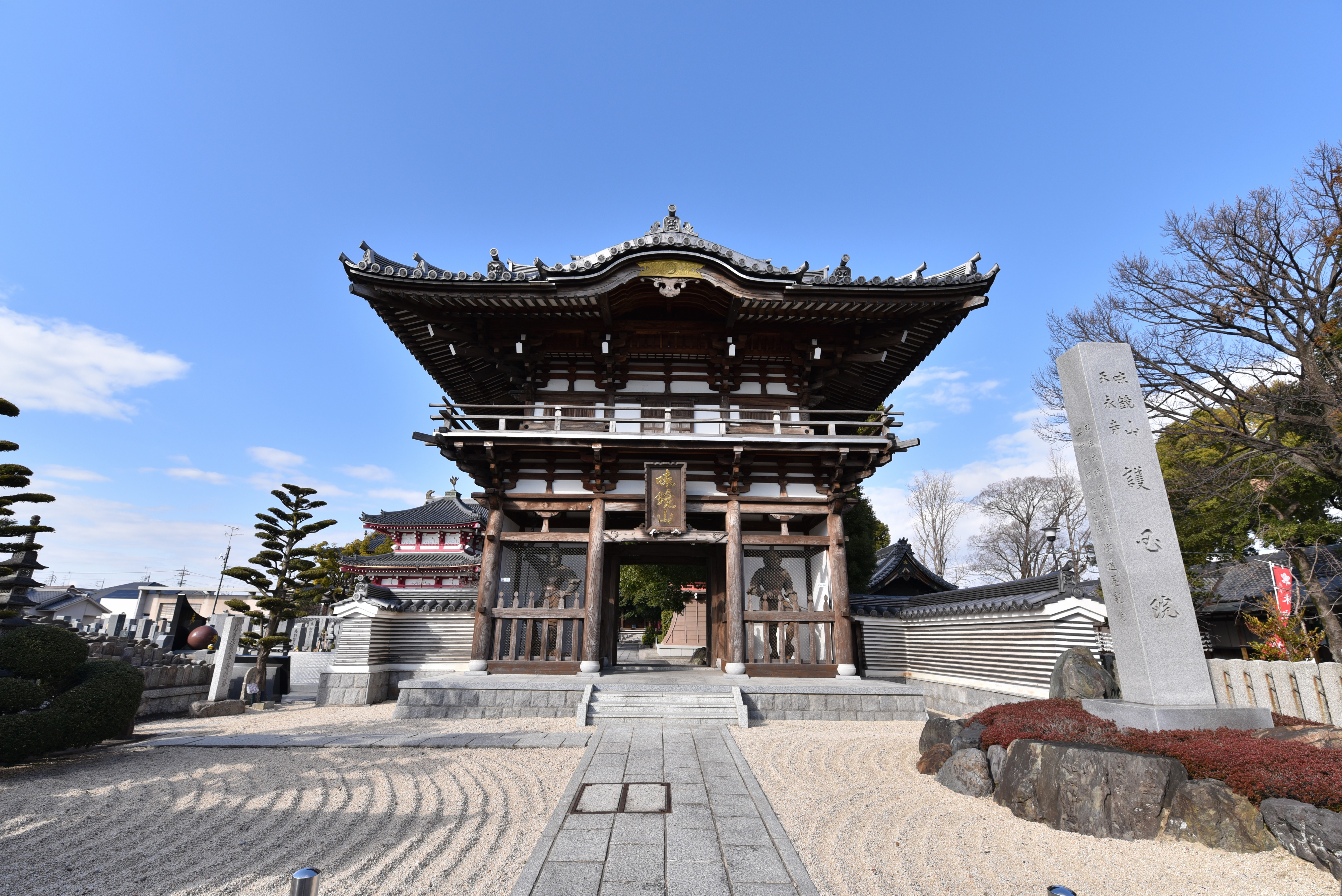 護国院の山門 Nikon D750